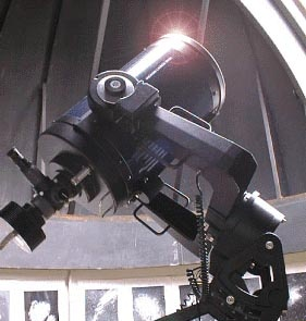 טלסקופ על מעמד מזלג